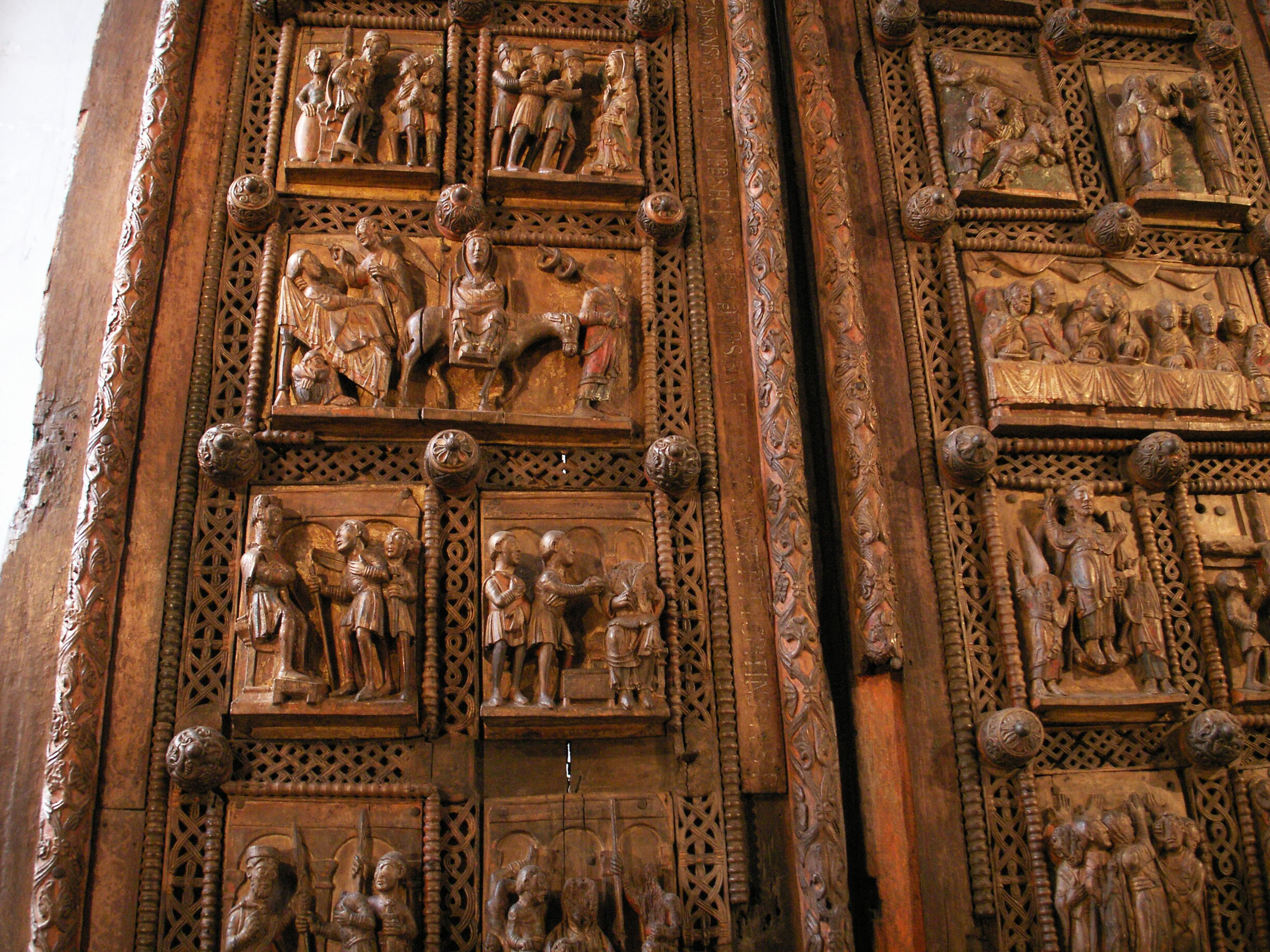 St. Maria im Kapitol, Köln, Romanische Holztüre